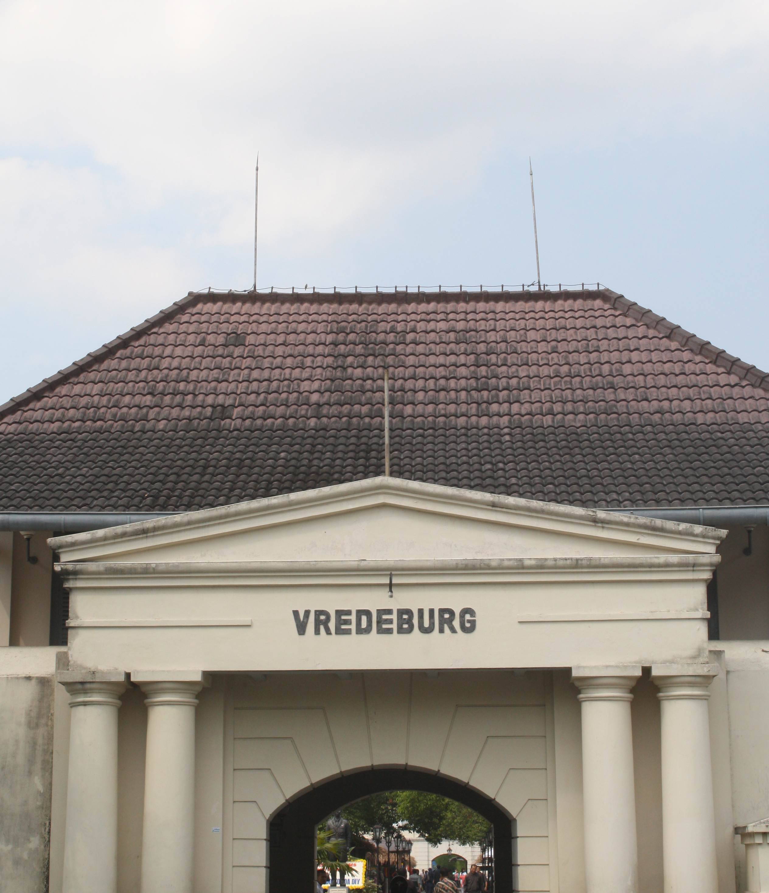 Benteng vanderburg adalah salah satu benteng yang berada di tengah kota di Yogyakarta tepatnya ada di kawasan Malioboro Jawa Tengah Indonesia